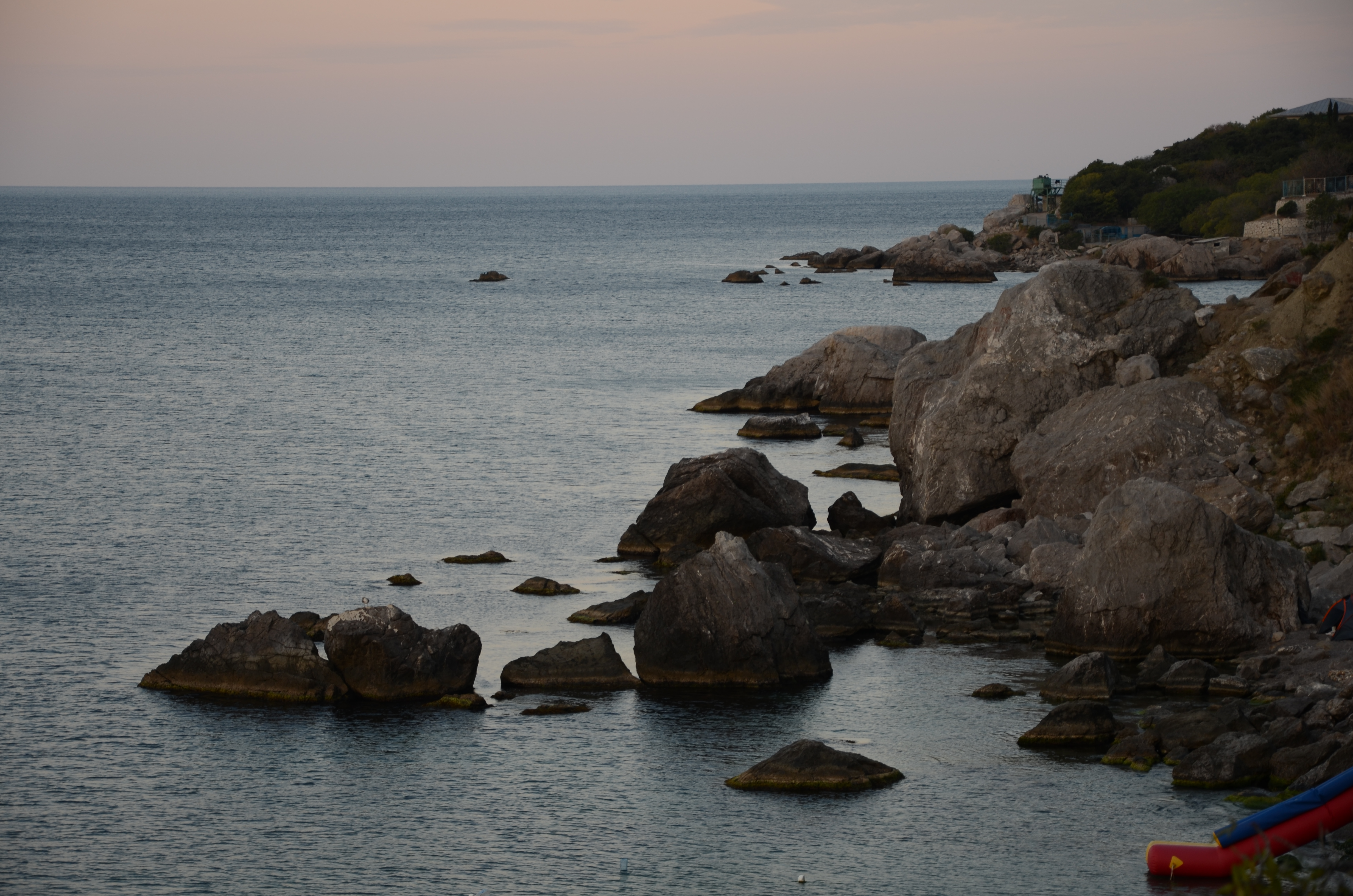 Вид на Батилиман